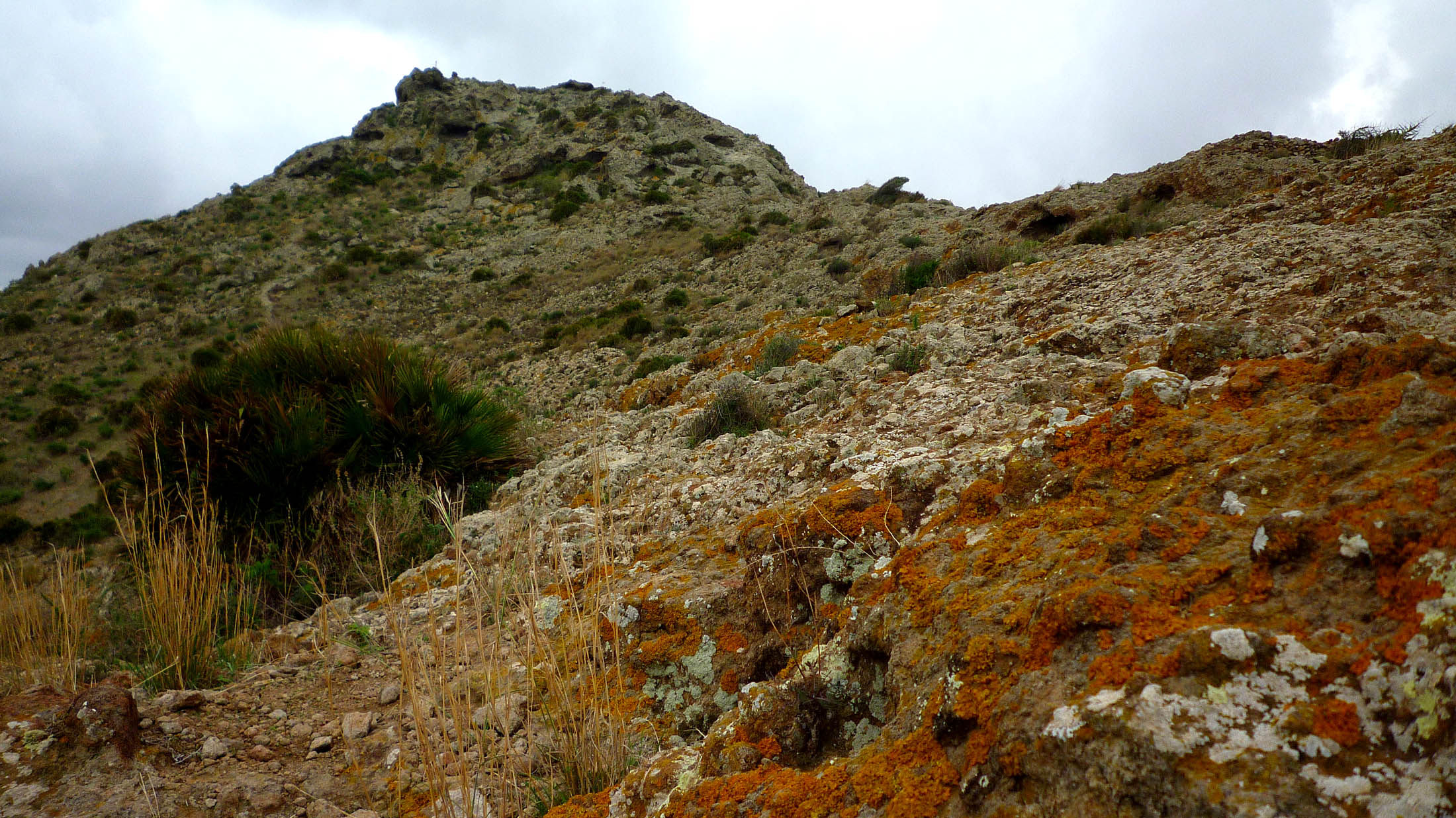 El Carmolí. Volcán extinto situado en el Campo de Cartagena.